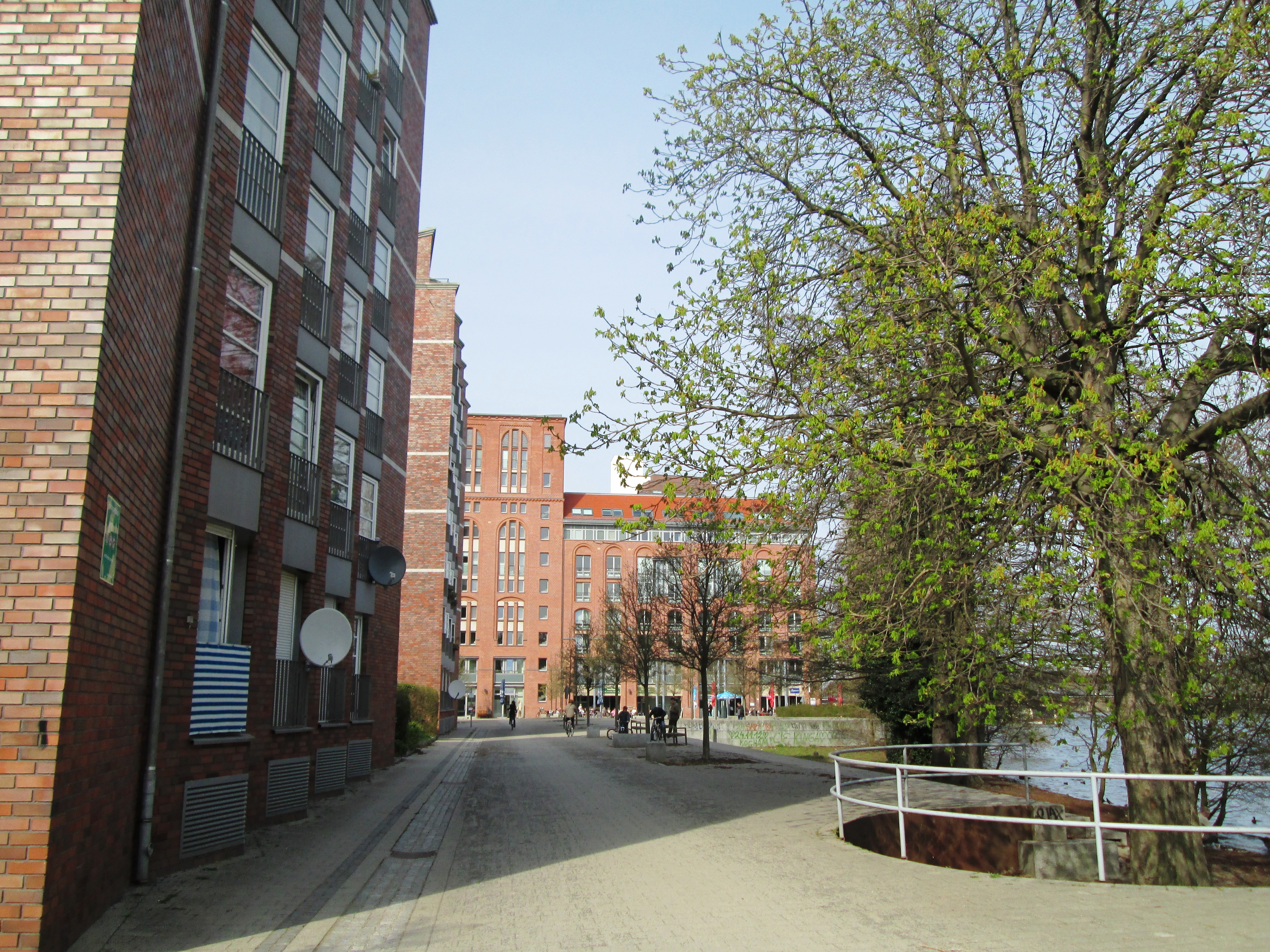 Straße "Frieda-Arnheim-Promenade", Berlin-Spandau (OT Hakenfelde), an der Havel